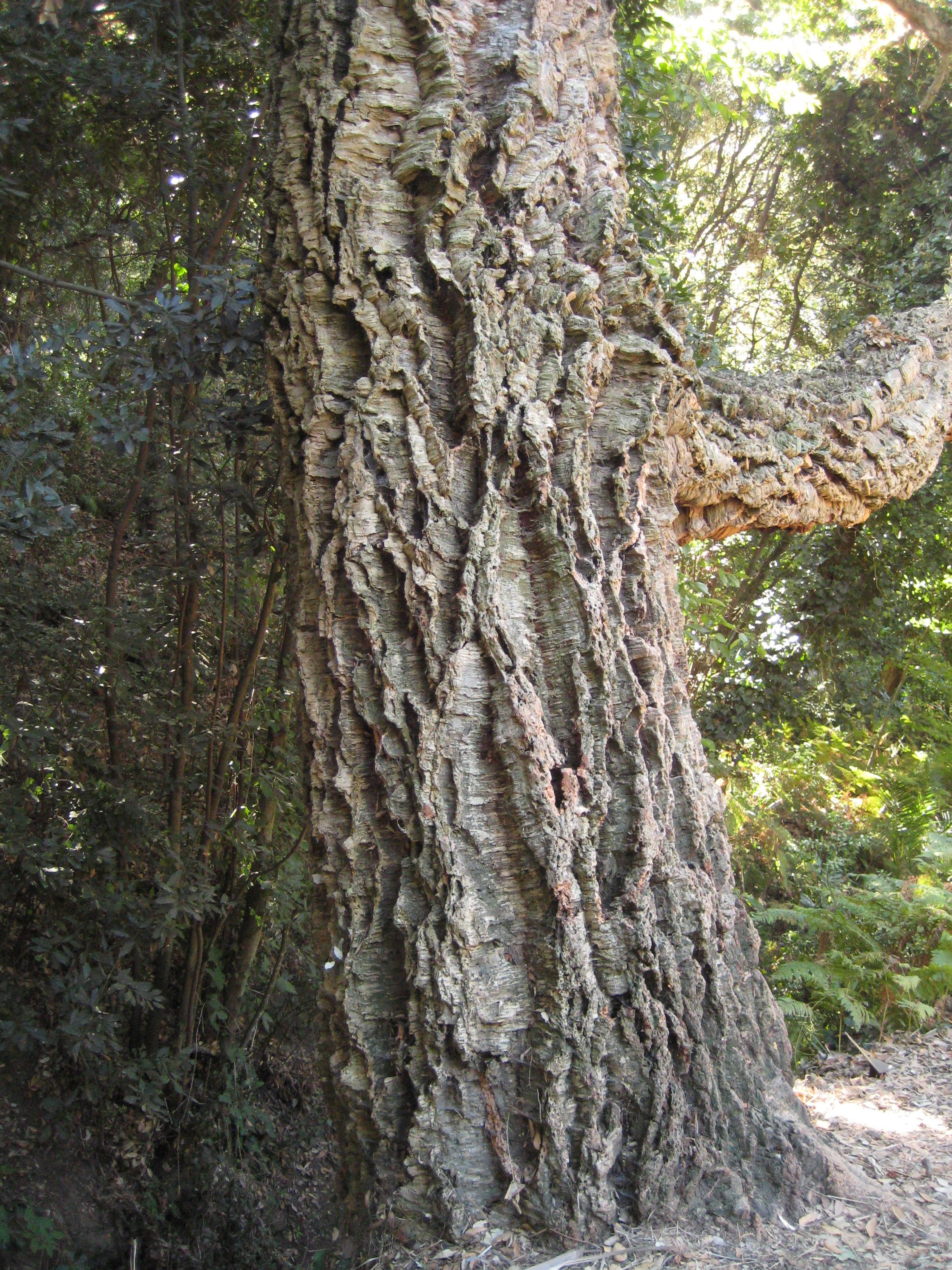 Korkeiche, ungeschält in der "Domaine du Rayol, Côte d`Azur